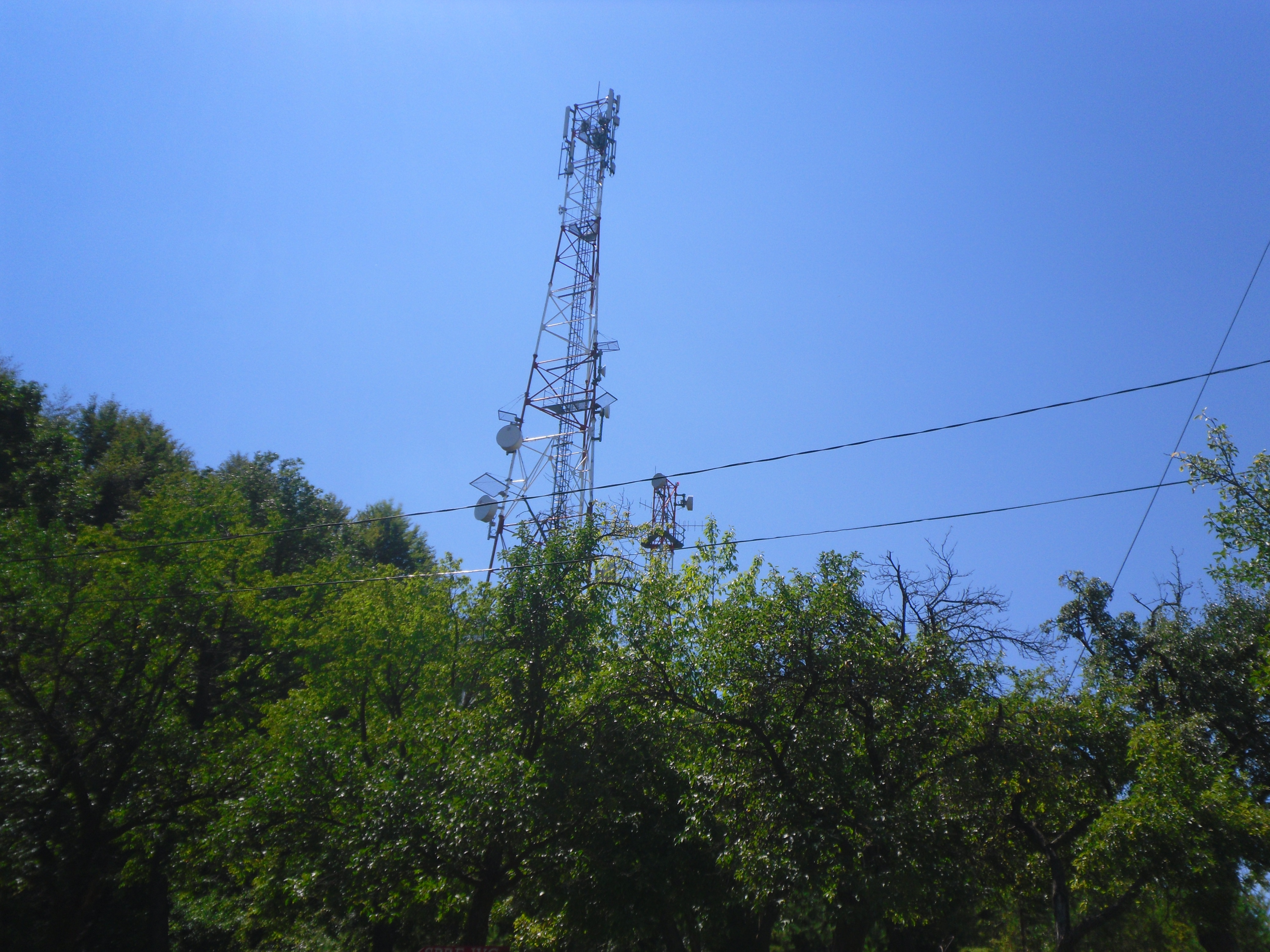 Turnuri pentru transmiţătoare unidirecţionale 2G, 3G, 4G Orange şi Vodafone în Târgu Ocna, jud. Bacău